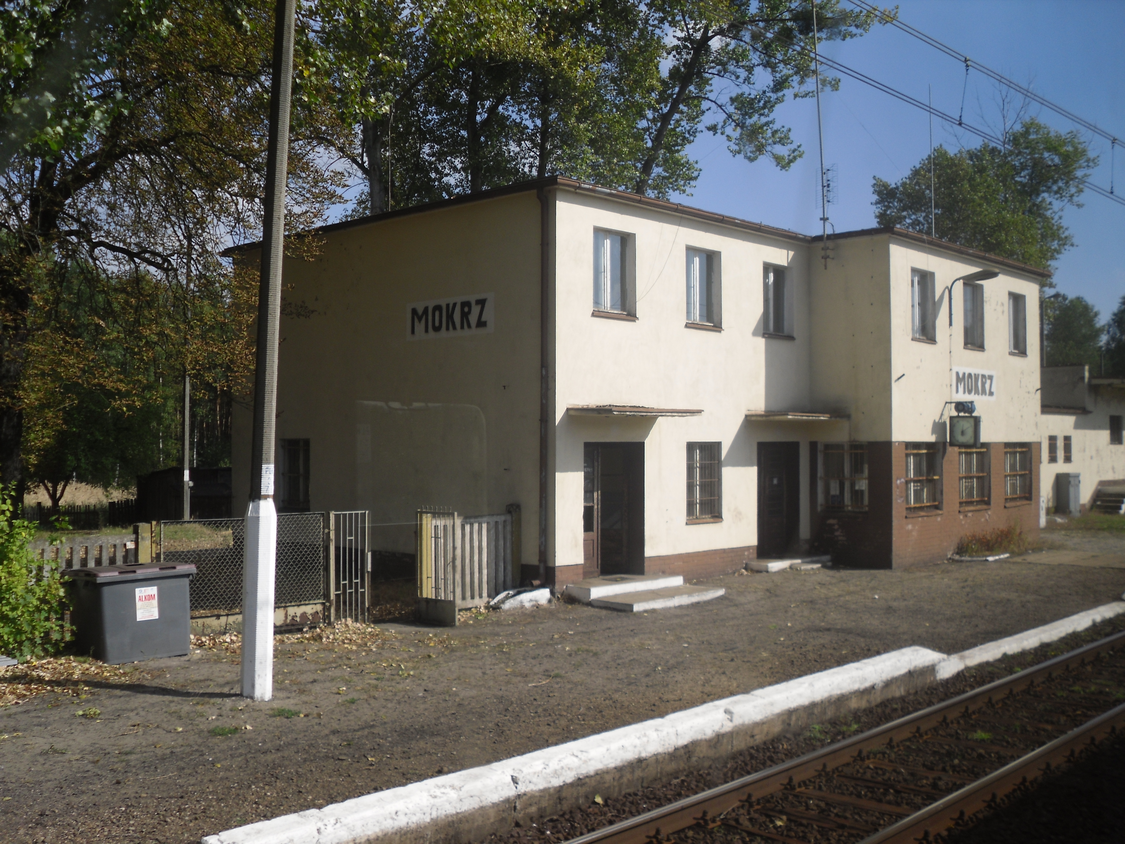 Dworzec w Mokrzu